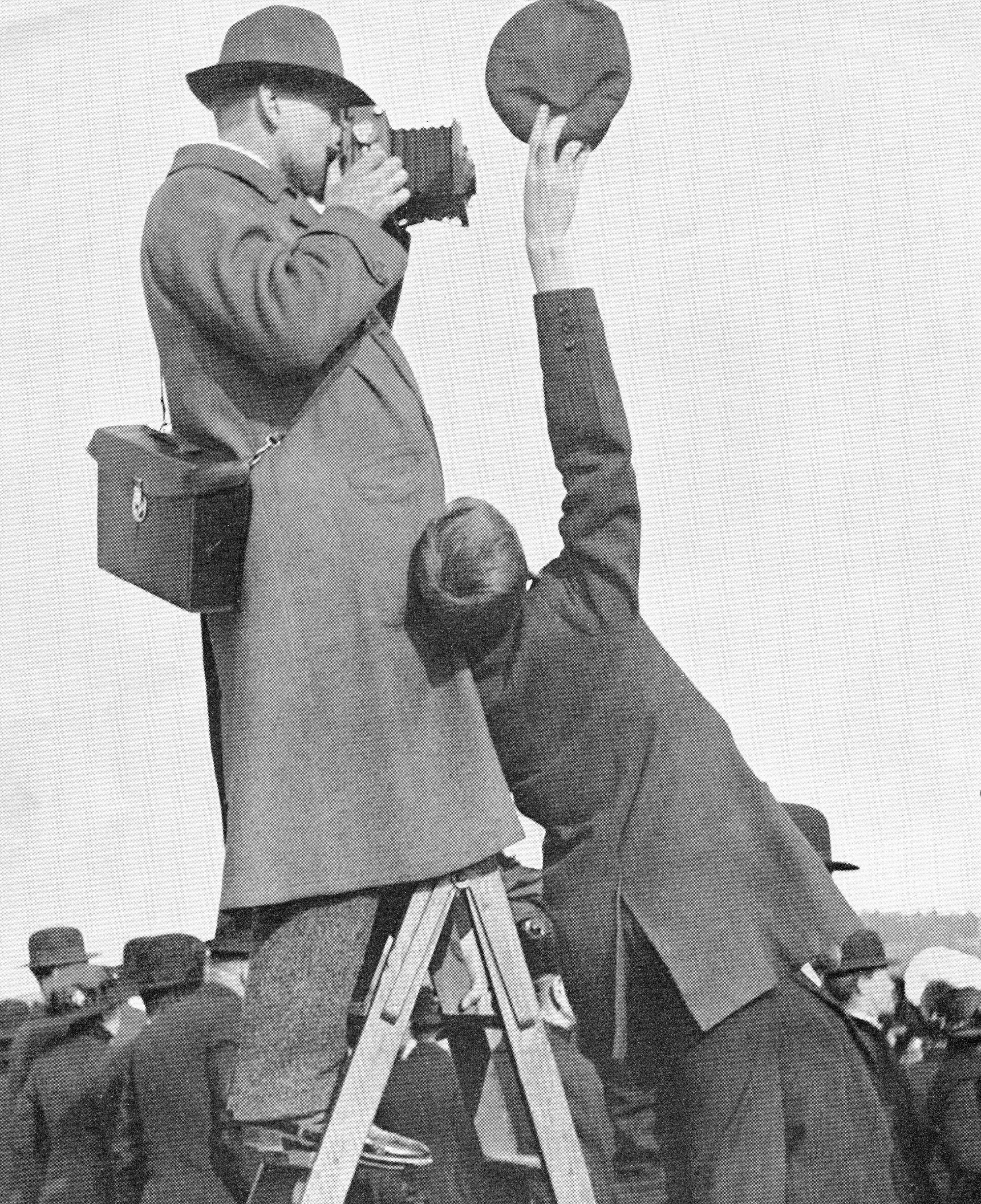 Axel Malmström 1915, Gärdet, 1 maj-demonstrationer, sonen Viktor skuggar objektivet med sin mössa.